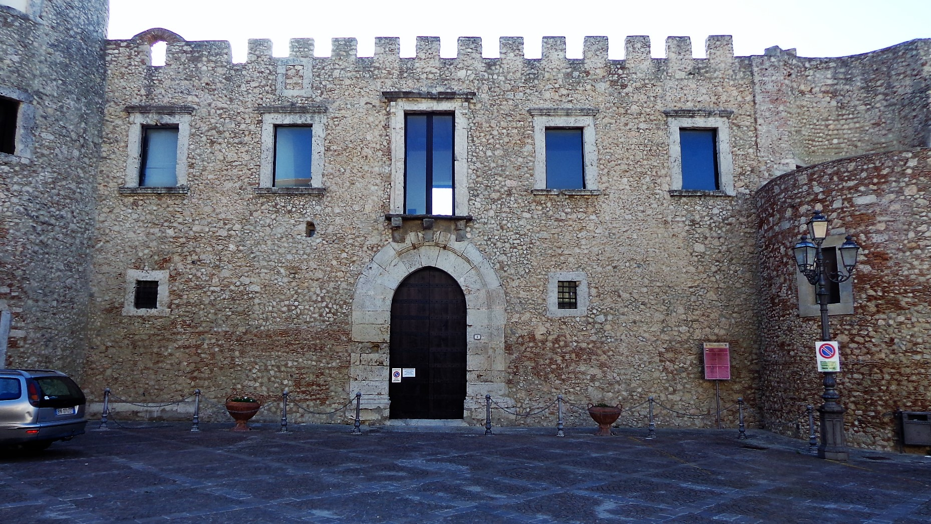 Prospetto.